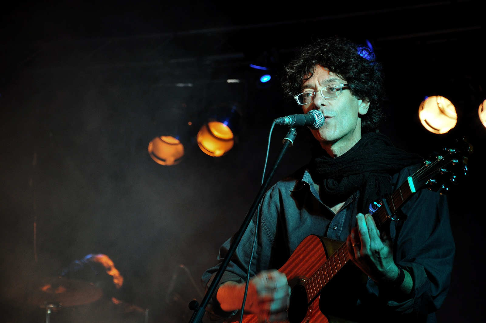 Massimo Zamboni in concerto "Solo una terapia: DAI CCCP ALL’ESTINZIONE" Santa Lucia (NU) - 2012